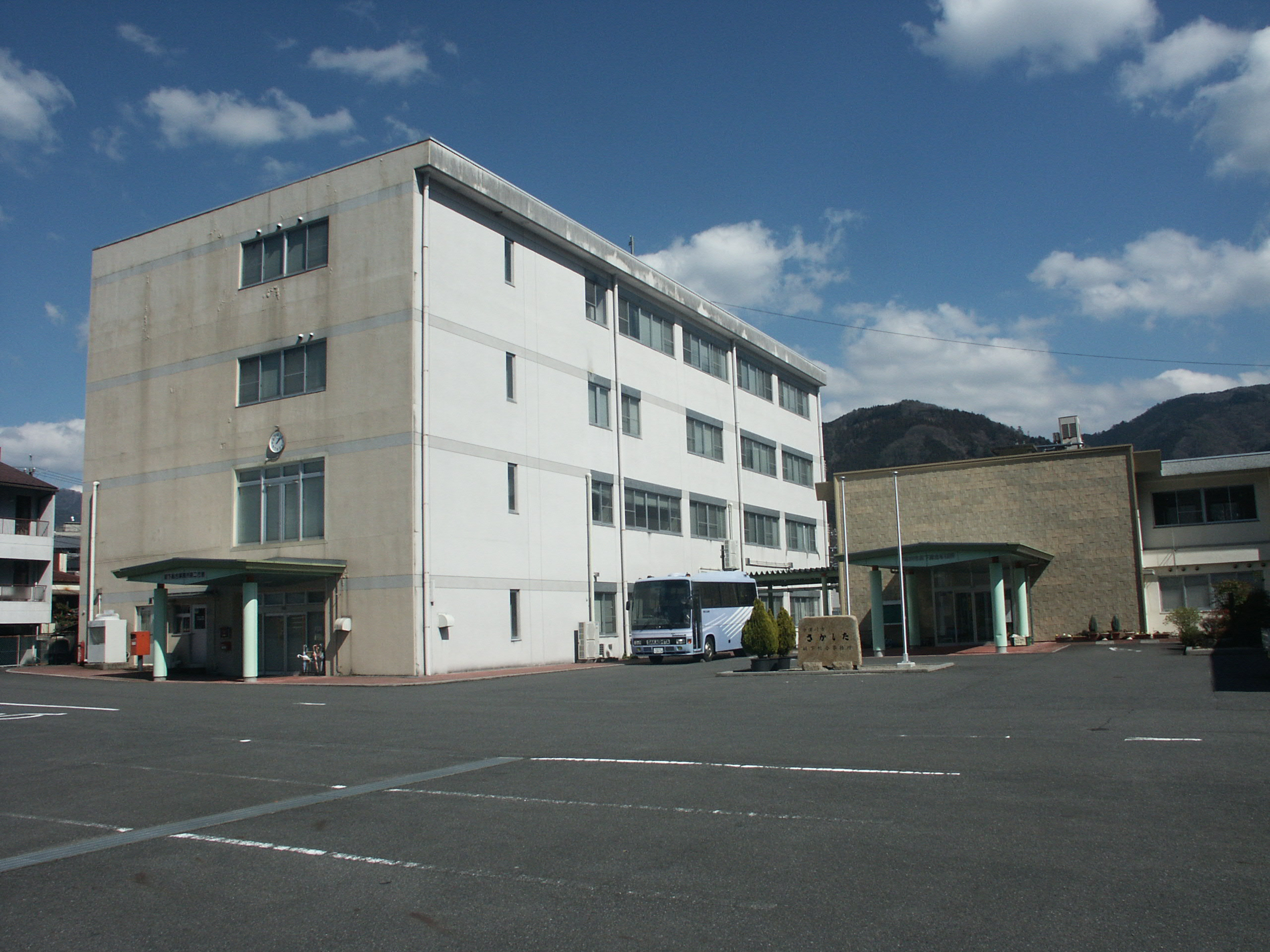 中津川市役所坂下総合事務所庁舎